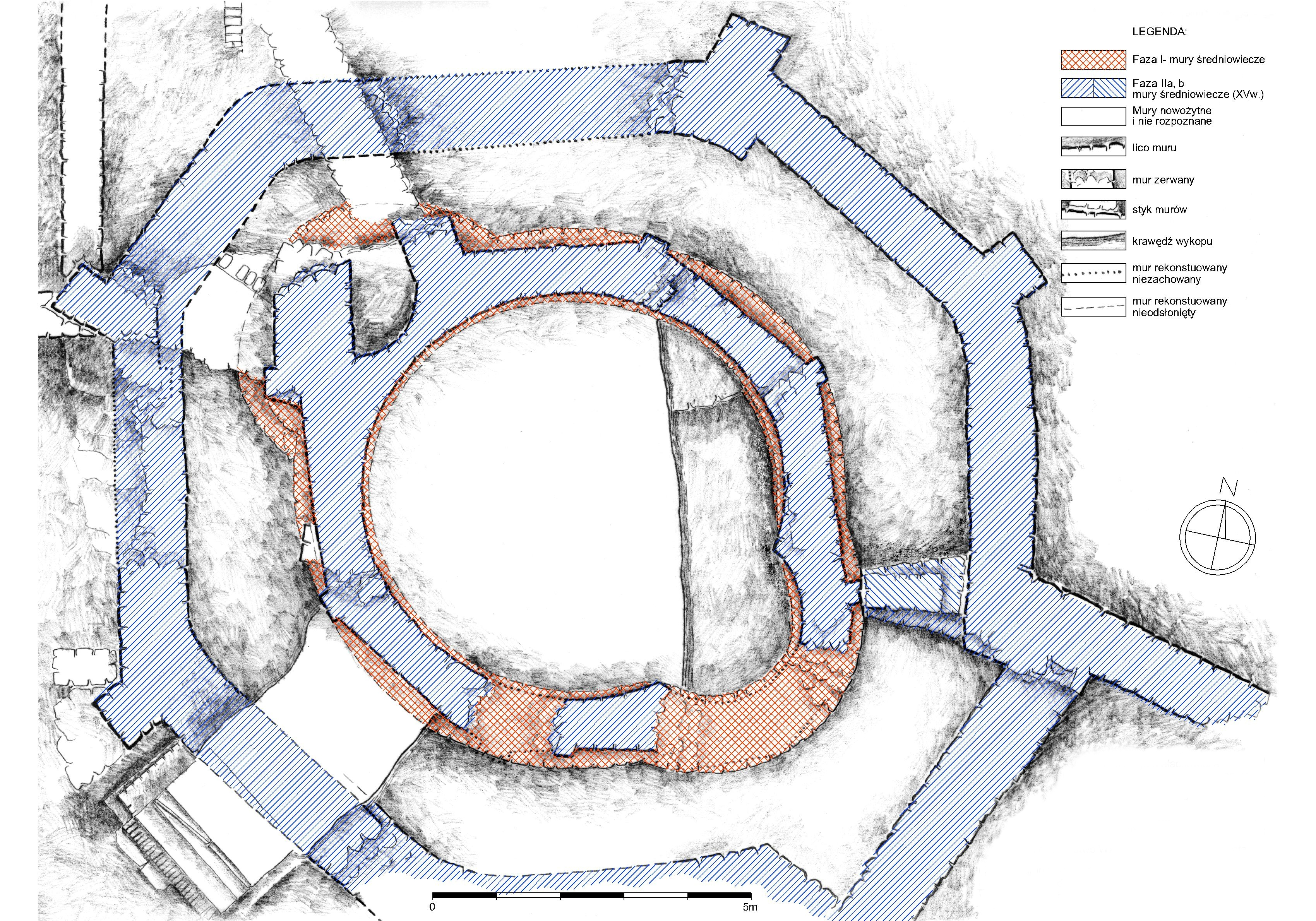 Gromnik, rozwarstwienie chronologiczne średniowiecznych reliktów murów zamku (donżonu) i dwuabsydowej rotundy